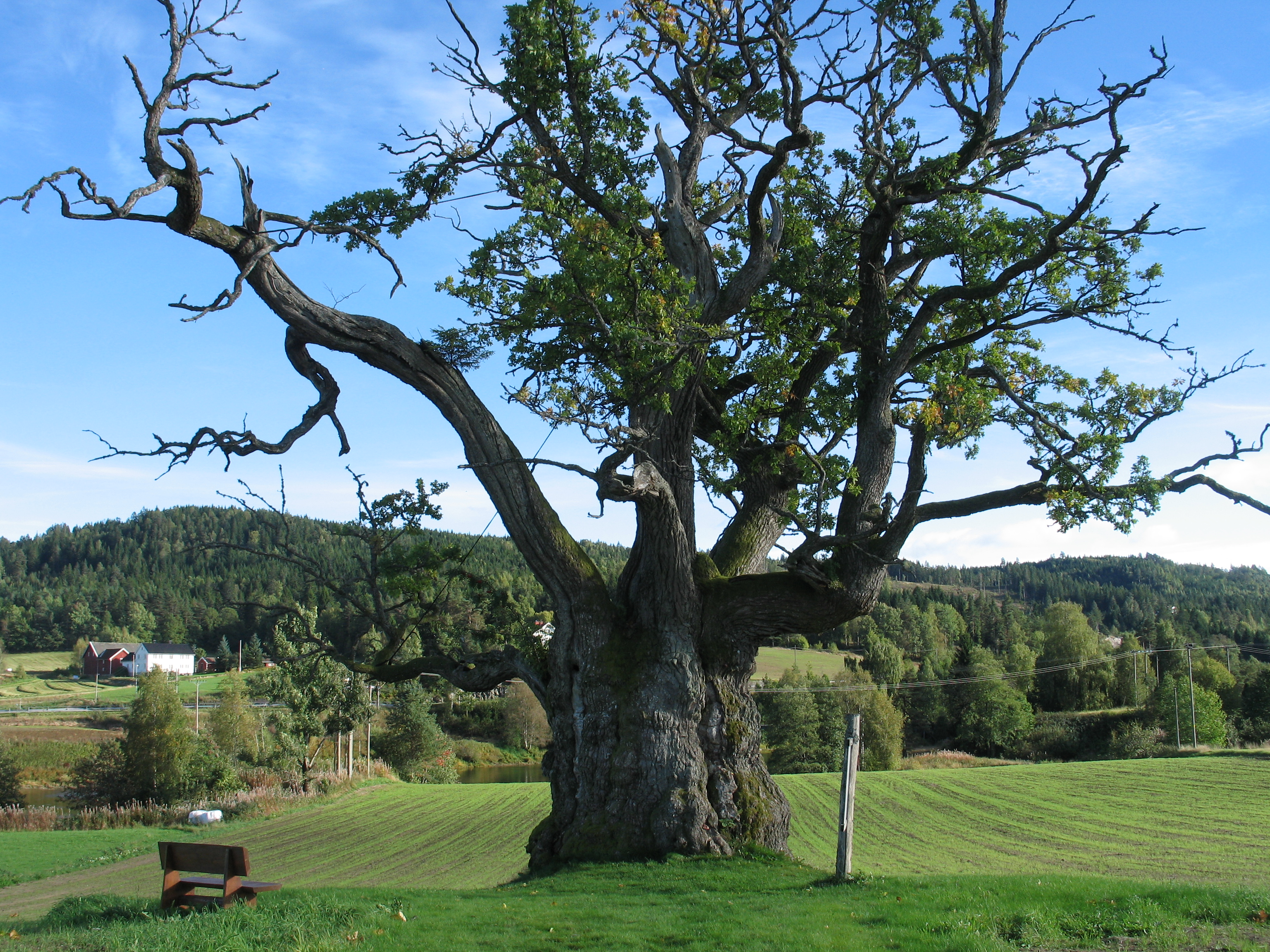 Mollestadeika i Birkenes